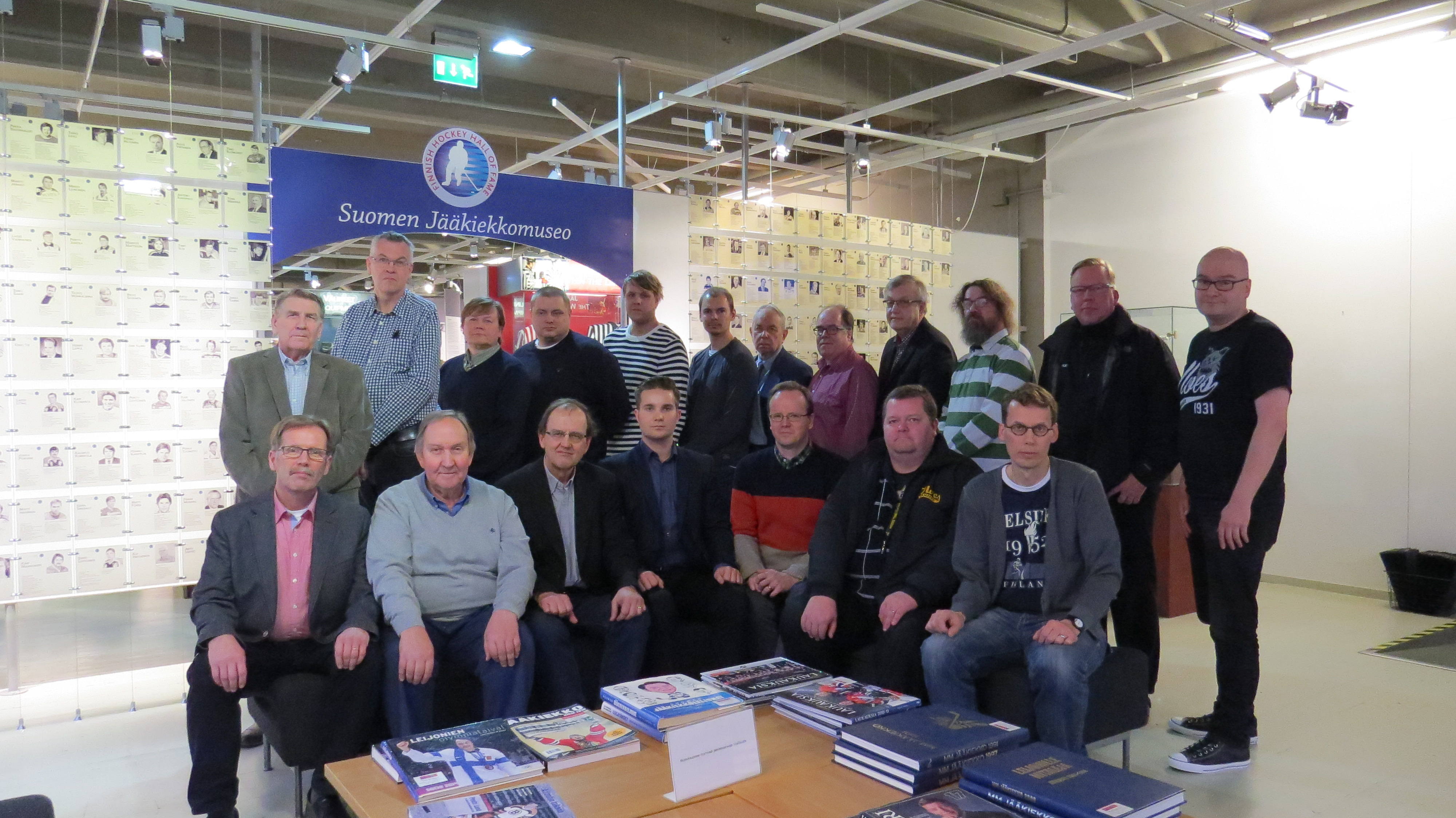 SJHS perustettiin 5.12.2015 Tampereella Vapriikin tiloissa. Seuran ensimmäinen hallitus eturivissä vasemmalta Matti Hannula, Kimmo Leinonen, Hannu Kauhala (puheenjohtaja), Kimmo Isotalo, Antti Seppänen, Jari Vainio ja Ossi Viita. Takarivissä muut perustamiskokoukseen osallistuneet (vasemmalta) Veikko Lintinen, Juha Aaltonen, Pekka Jyrkiäinen, Juha Hiitelä, Michael Sundsten, Mika Heinonen, Tom Ratschunas, Markku Kasila, Olav Björkstrand, Arto Nieminen, Ari Mennander ja Janne Sarna.